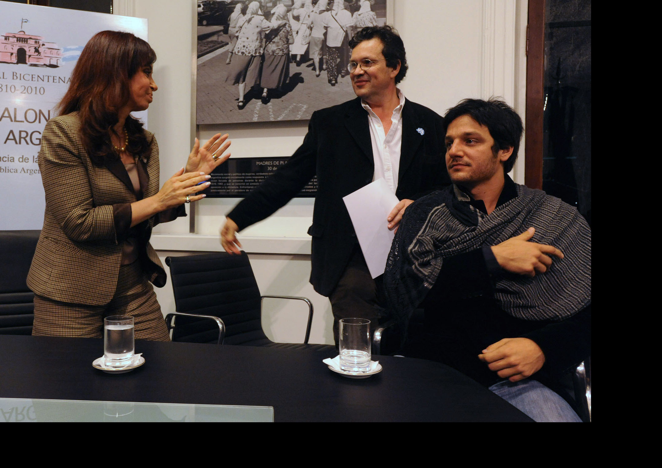 La Presidenta junto al direcctor del Sistema Nacional de Medios, Tristan Bauer, y el actor Rodrigo de la Serna.